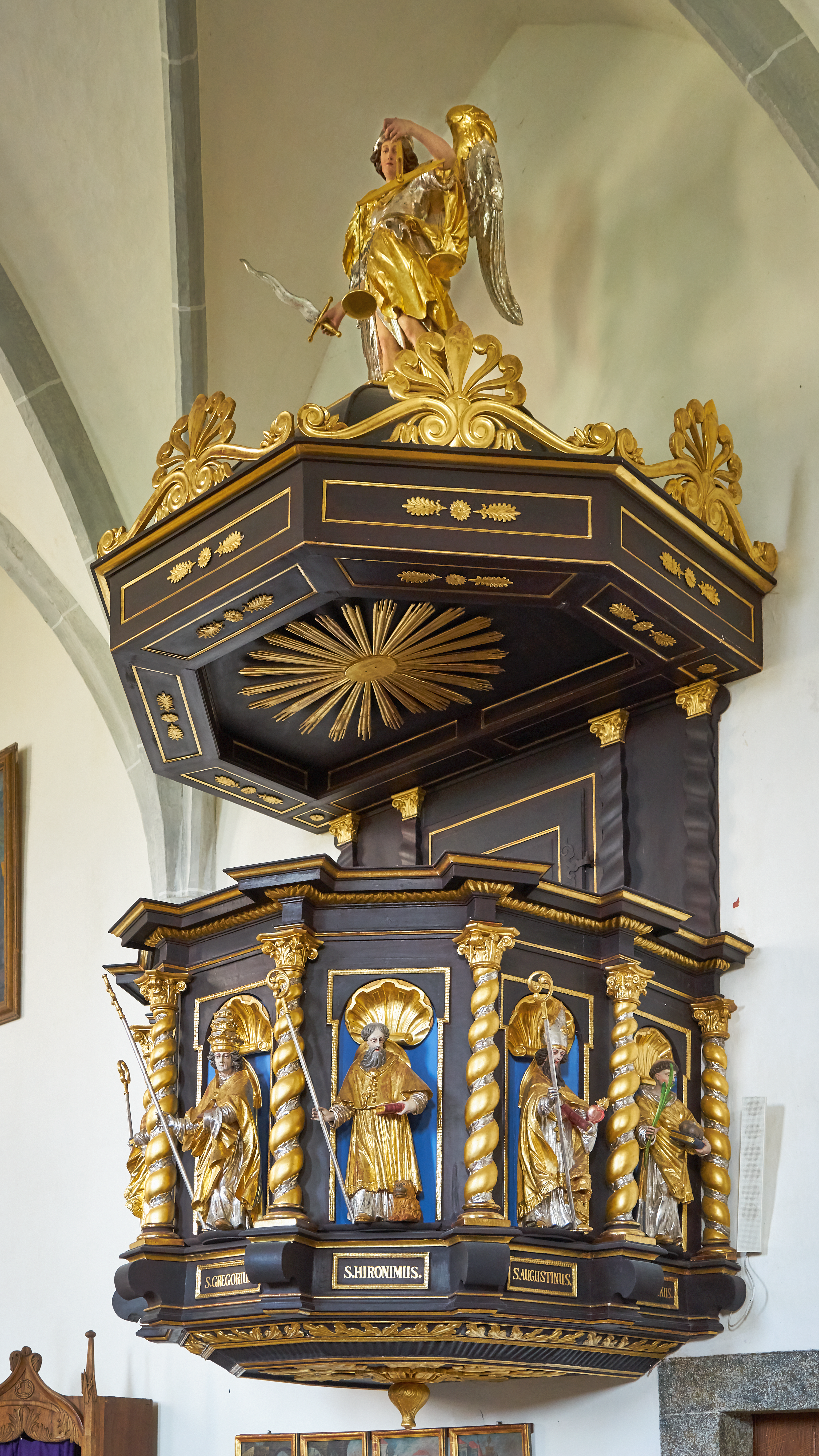 Die Kanzel ist an der südlichen Wand beim Eingang zum Chor angebracht. Sie wurde 1836 renoviert.